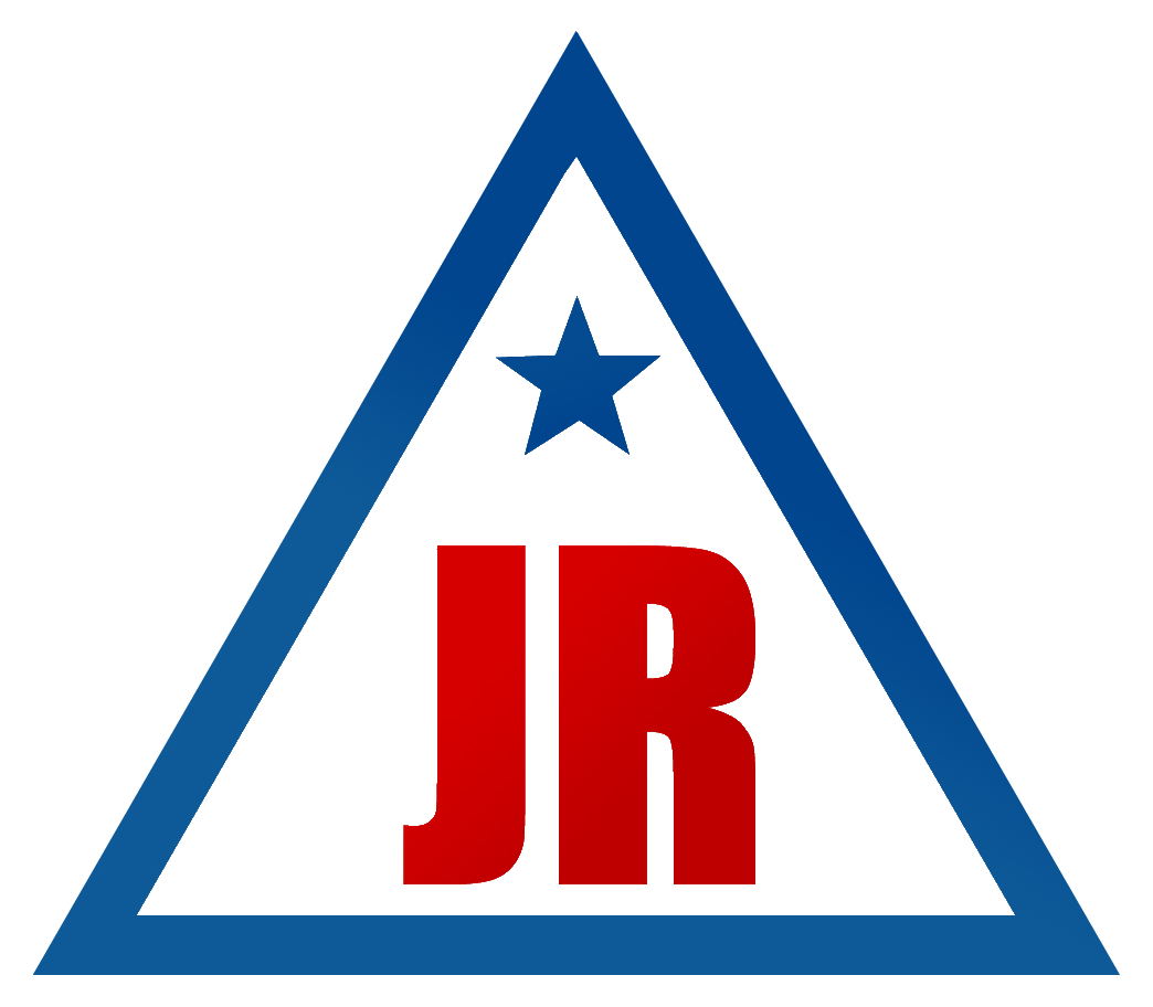 Emblema de la Juventud Radical de Chile, ala juvenil del Partido Radical Socialdemócrata.